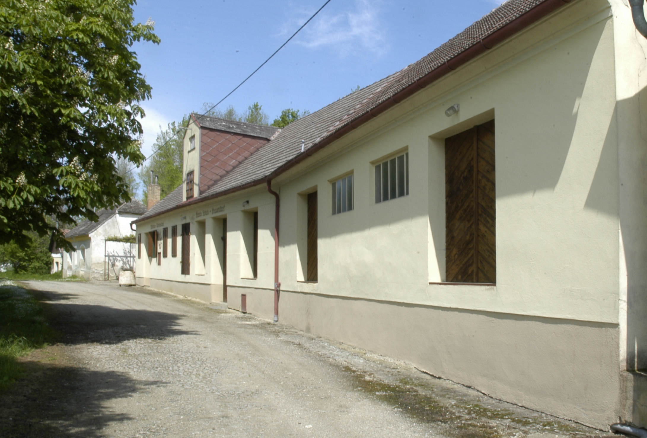 Objekt in der Mühlkellergasse in Frauendorf an der Schmida